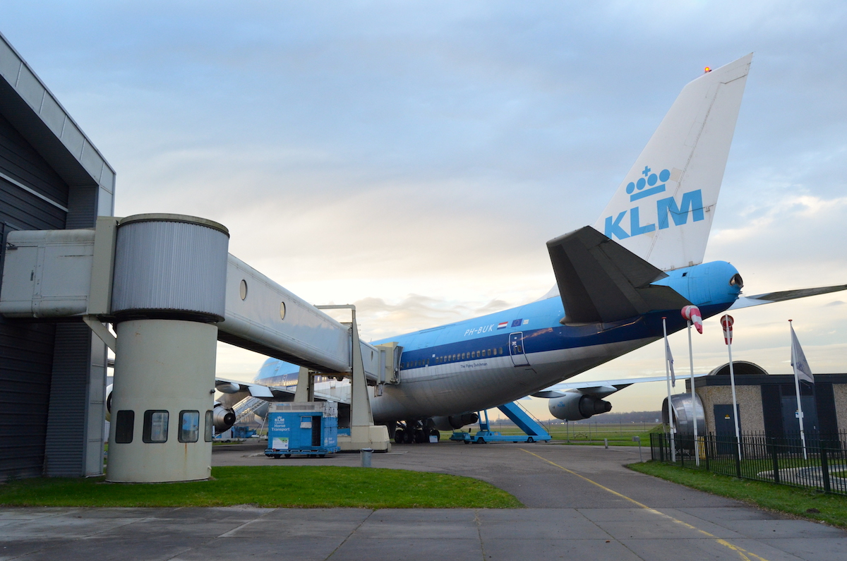 Aviodrome Lelystad. Boeing 747 (PH-BUK), achterzijde. Foto: Erik Swierstra.